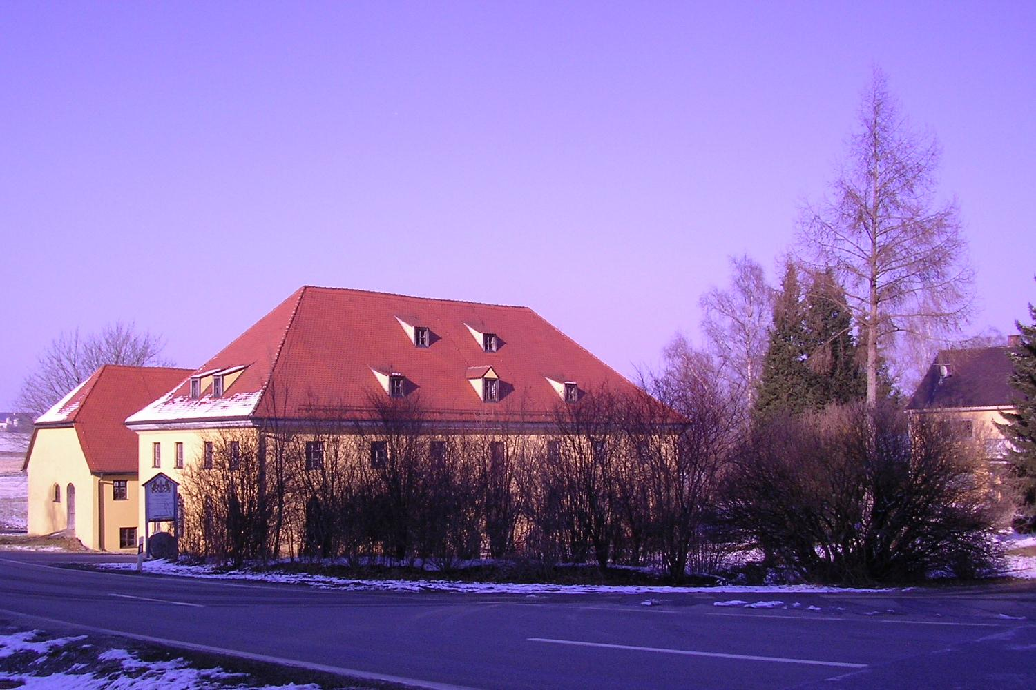 Furthmühle in Oberbayern, Ansicht, aufgenommen im Winter 2011.